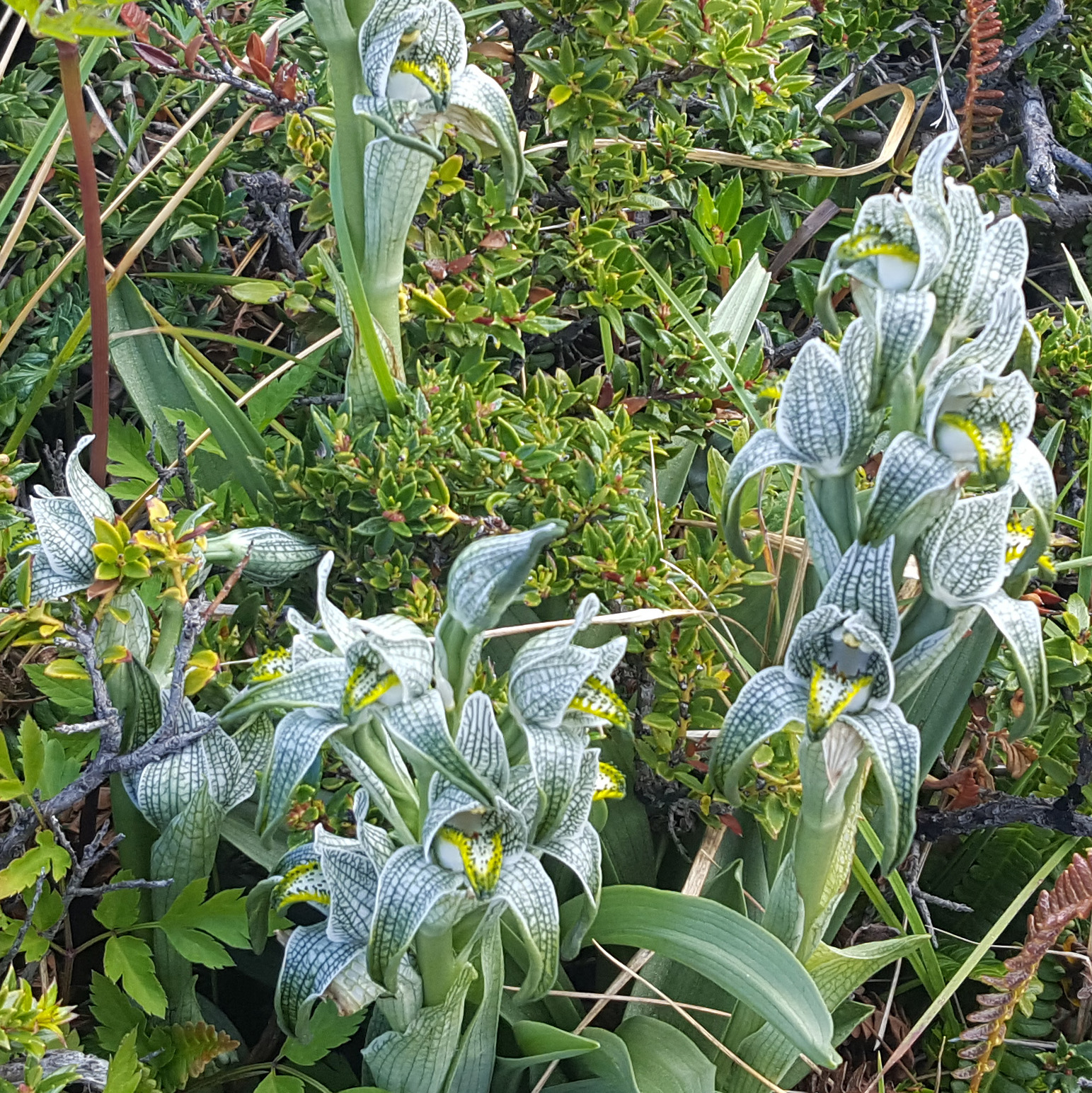 Orchidée porcelaine du Torres del Paine en Patagonie chilienne